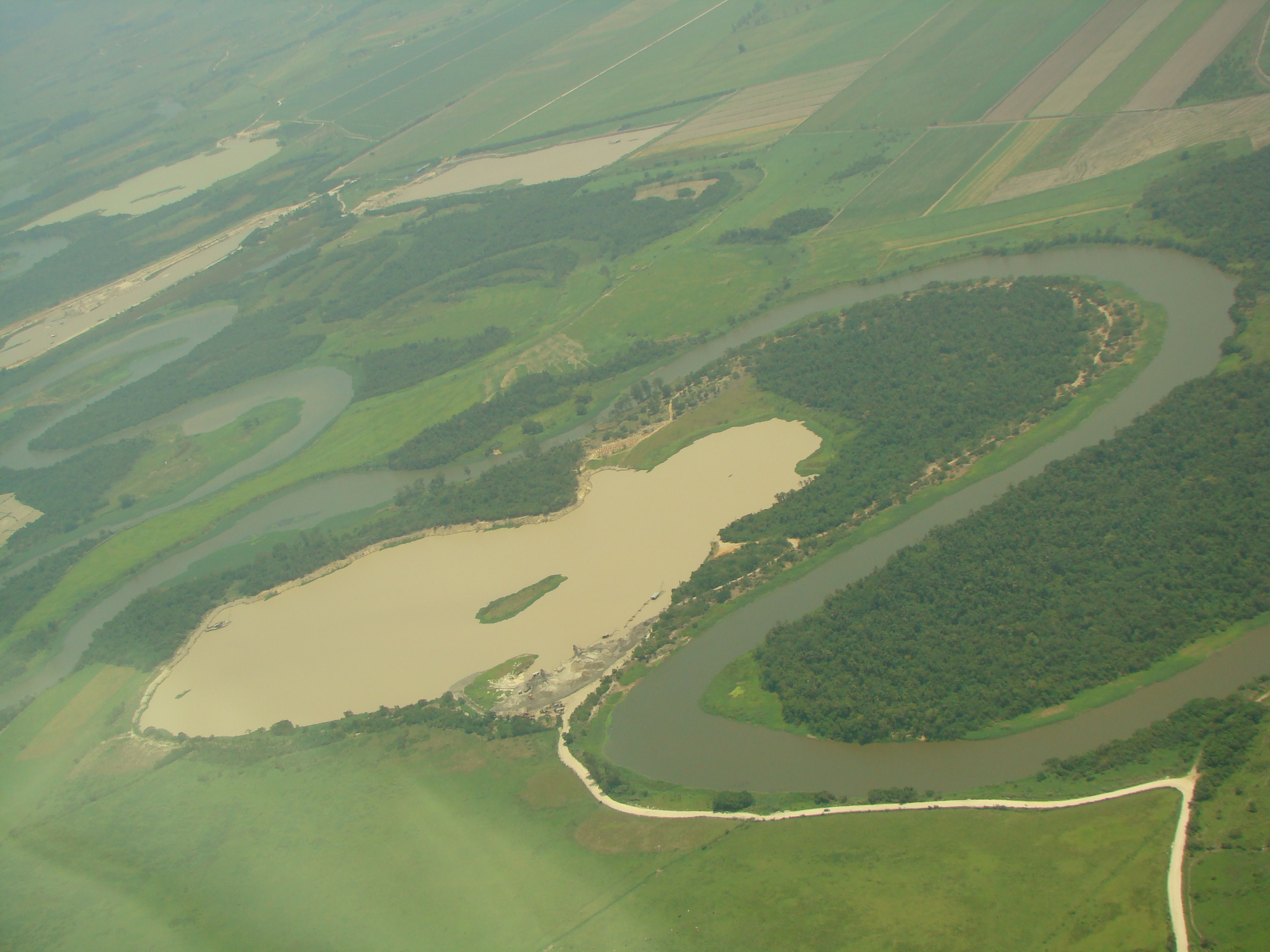 imagem da degradação do rio paraíba do sul em caçapava